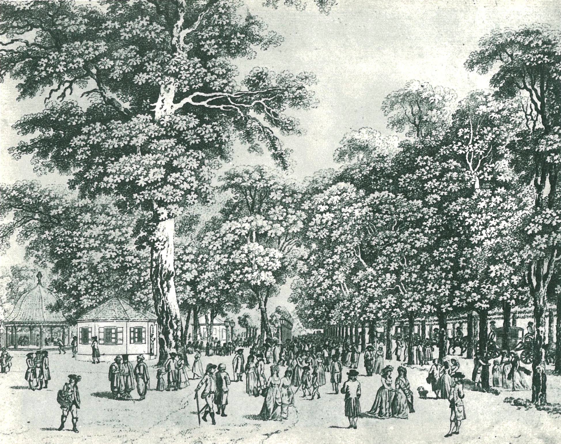 Prater um 1794